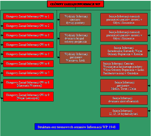 Organy terenowe Informacji Wojskowej na 31.12.1948 r - na podst.: Henryk Piecuch - Tajna Historia Polski "Kto Zabił, Bruderszaft ze śmiercią